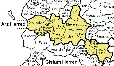 Års Herred, Aalborg Amt, Denmark Source: Map by Svend-Erik Christiansen